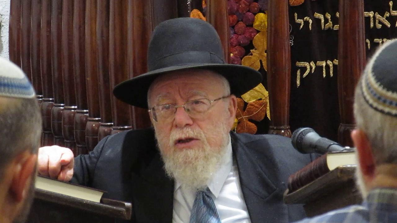 בשיעור ב"בית הרב". אייר ה'תשע"ג